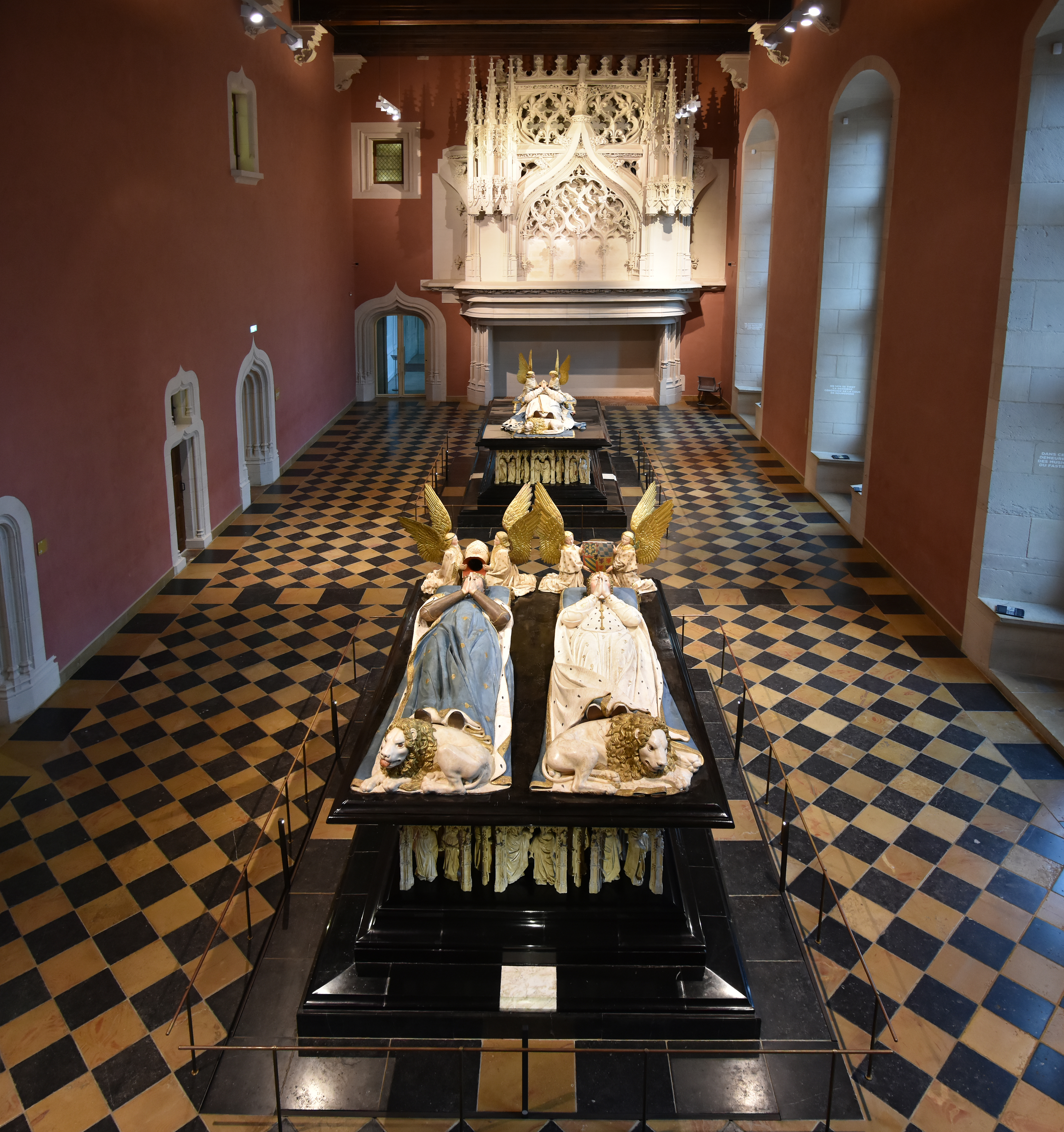 Praalgraven van Filips de Stoute - Jan zonder Vrees en Margaretha van Beieren (1363-1423) - Musée des Beaux-Arts de Dijon